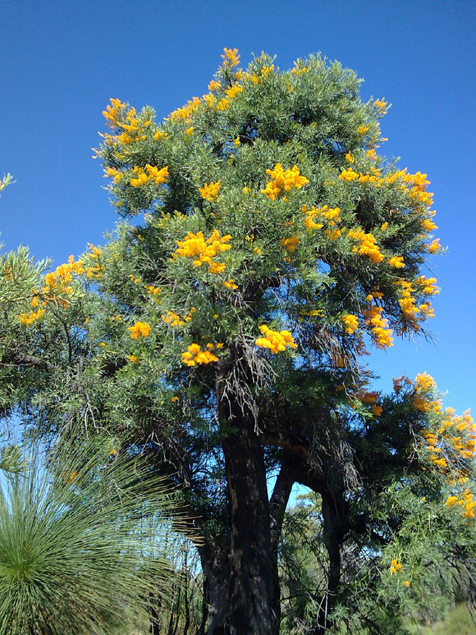 Nuytsia floribunda